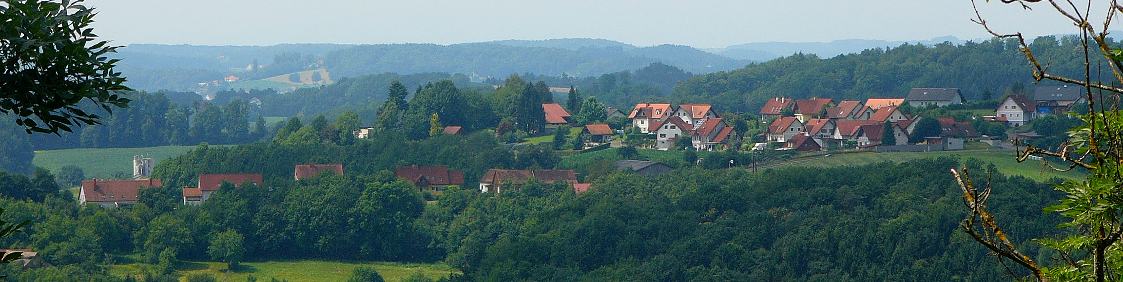 Blick auf Stantzebach von der Burg Riegersburg aus.